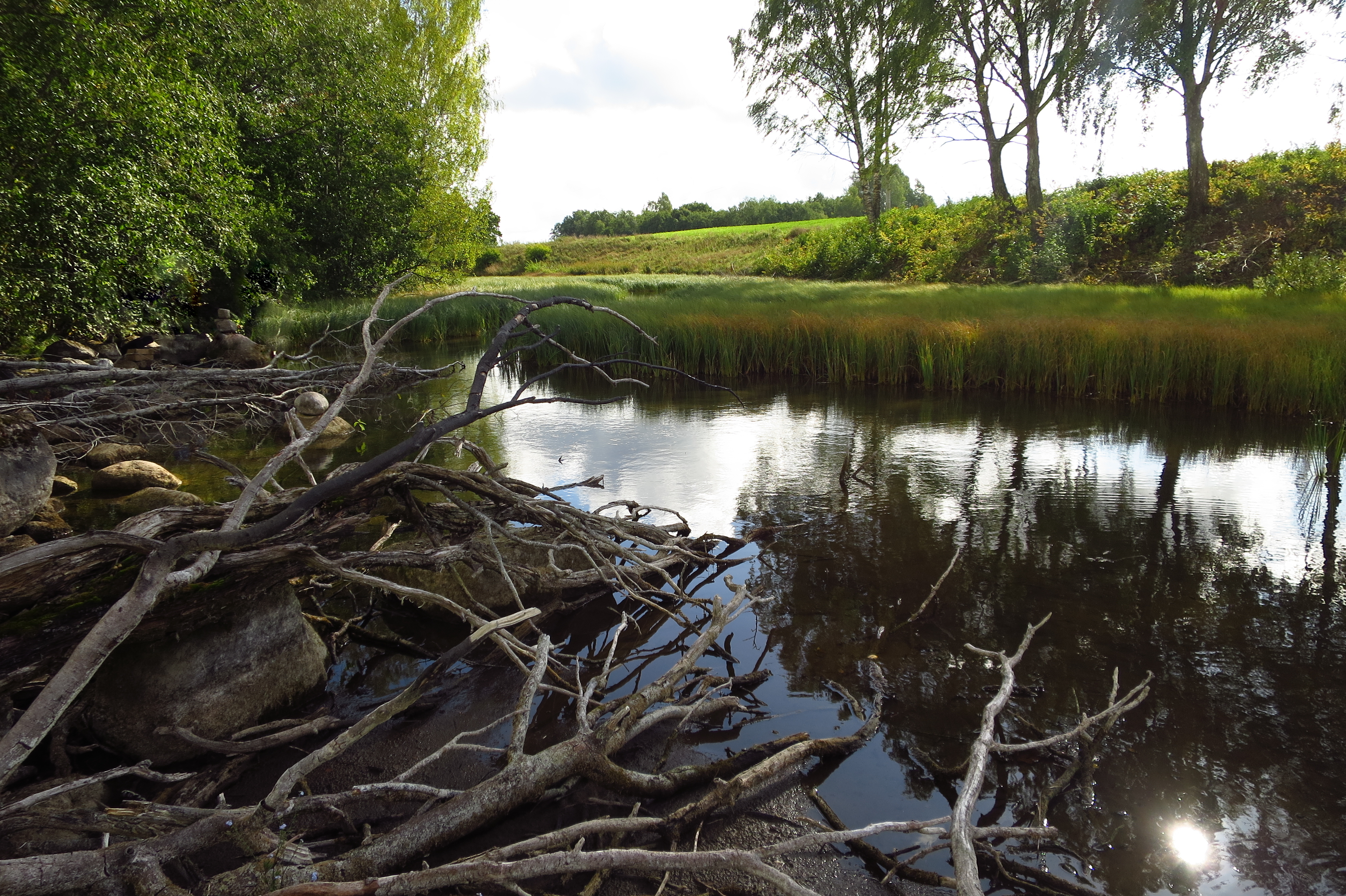 Vetiku allikad Lääne-Virumaal